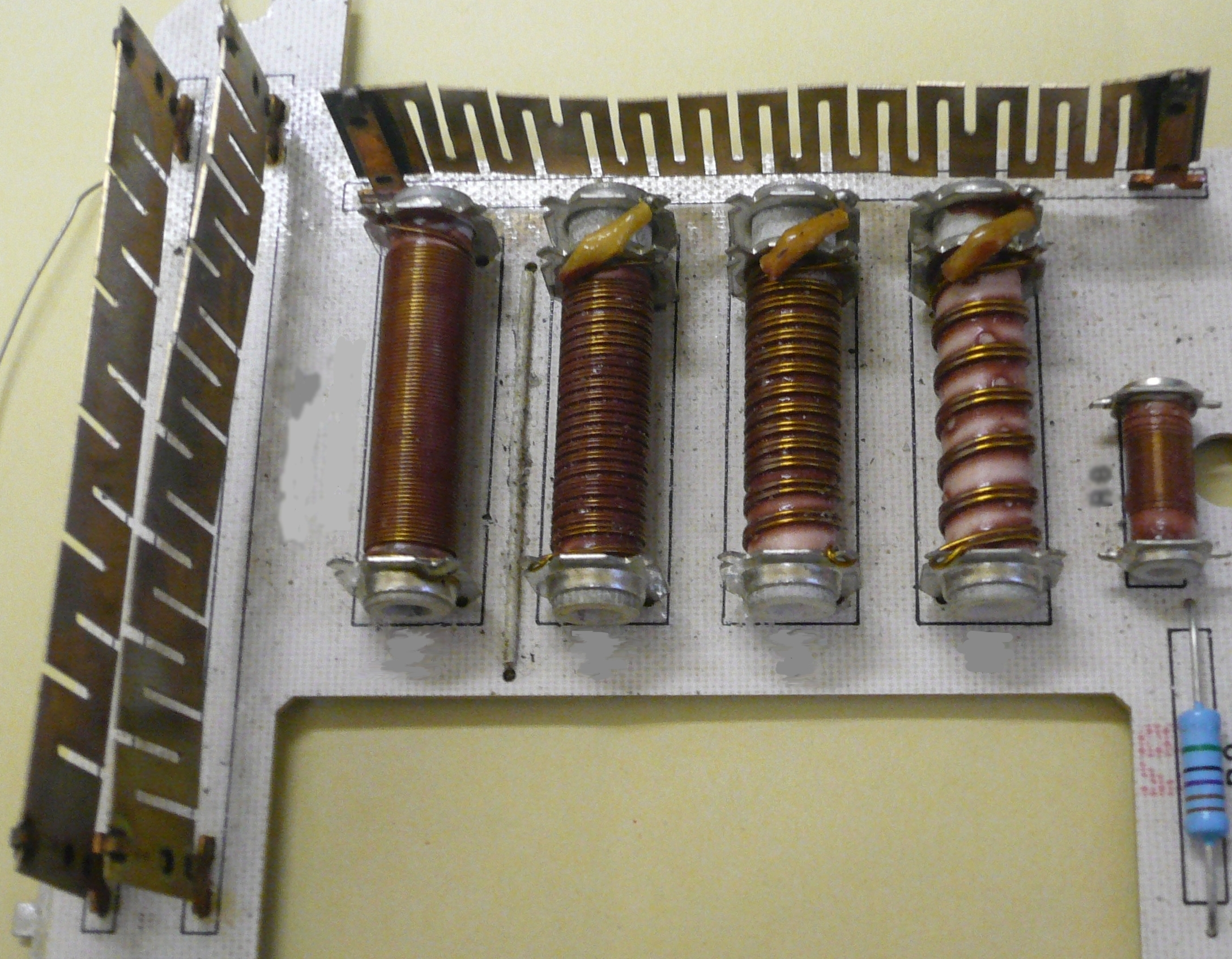 Ayrton sönt ellenállás.